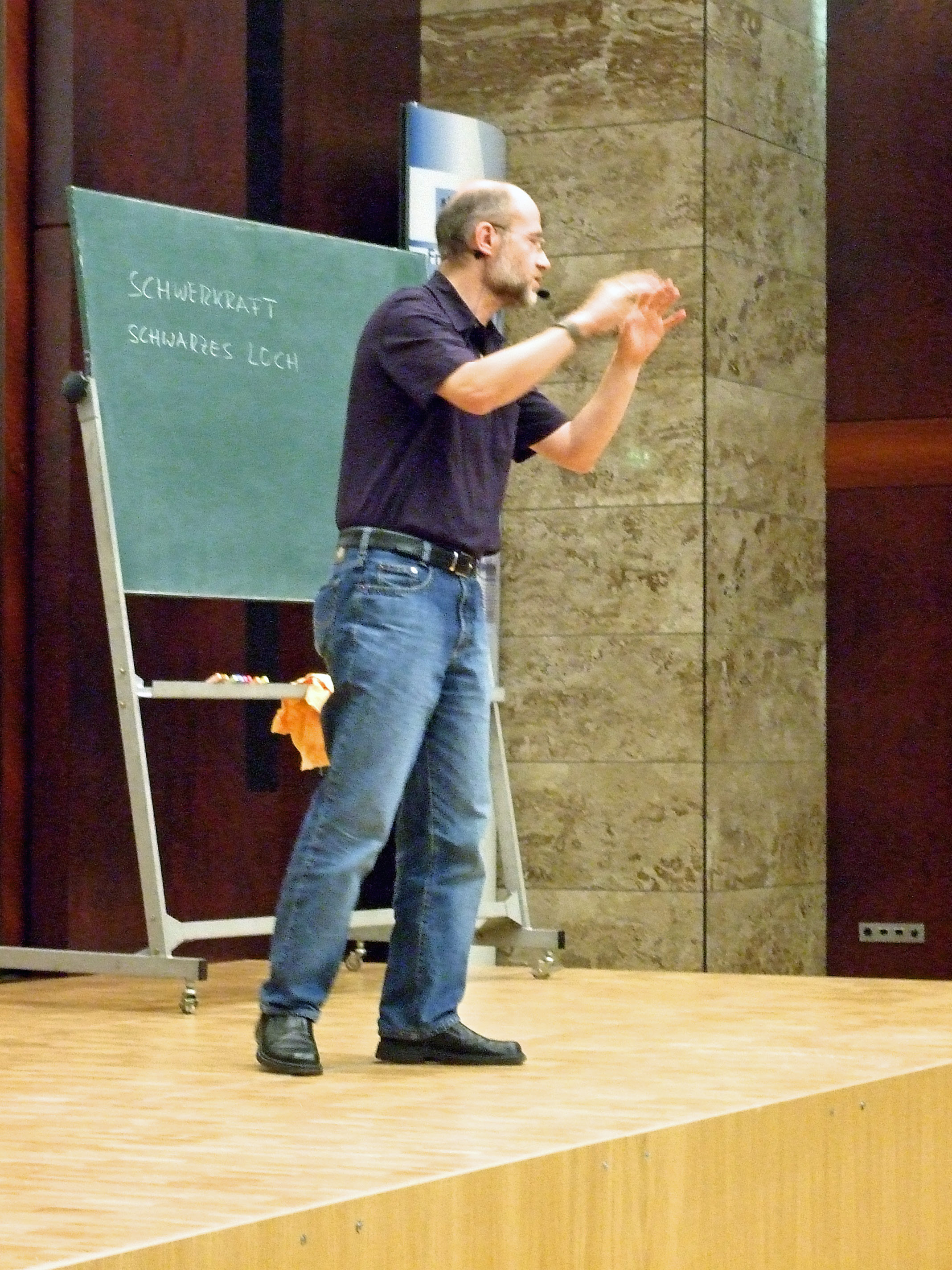 Harald Lesch, während seines öffentlichen Vortrages über schwarze Loecher, Materie und Energie, 2007 in Ffm